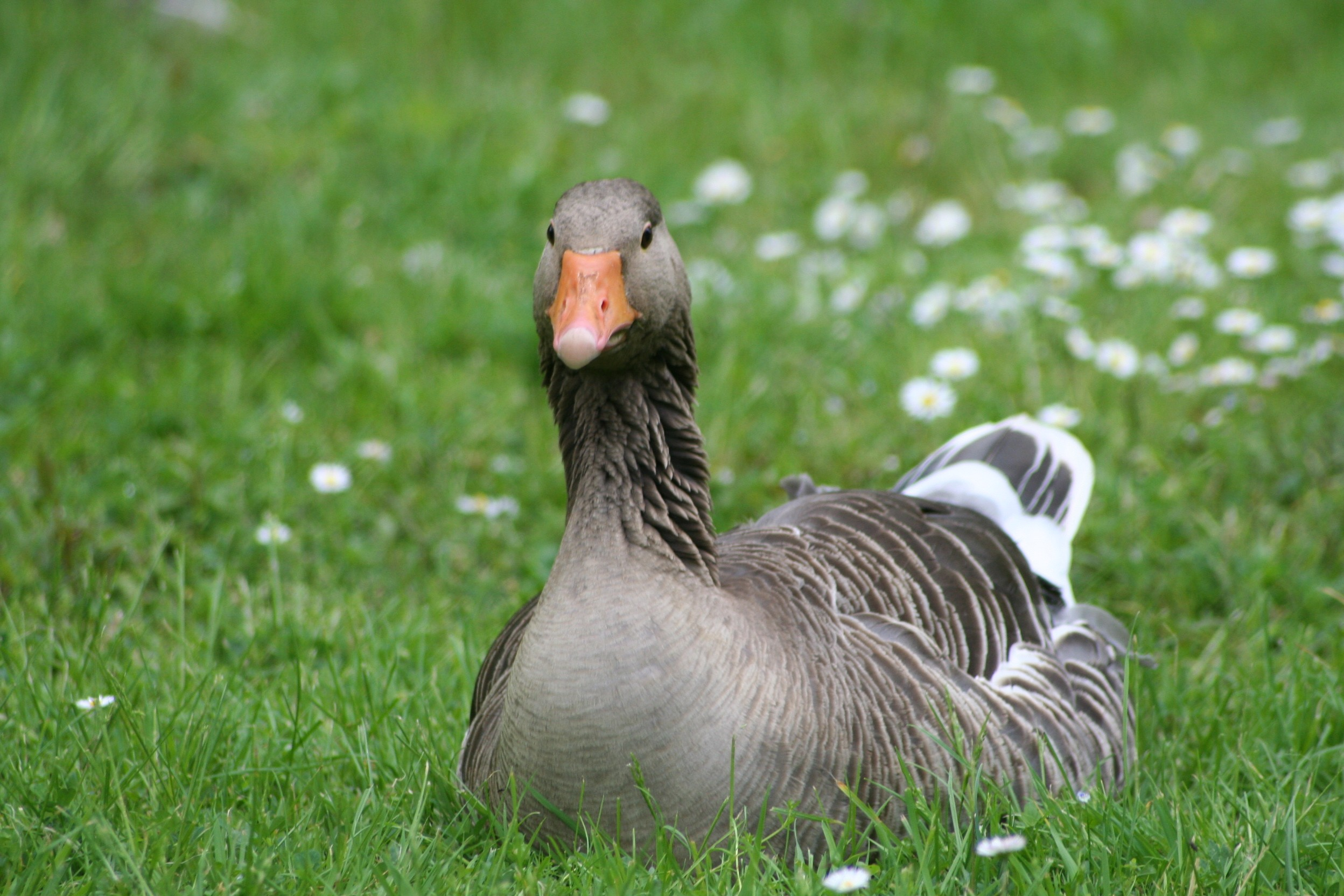 Anser anser. Photgraphiert im Schulgarten der Stadt Braunschweig, Nds., Deutschland. Digital aufgenommen, nicht nachbearbeitet.